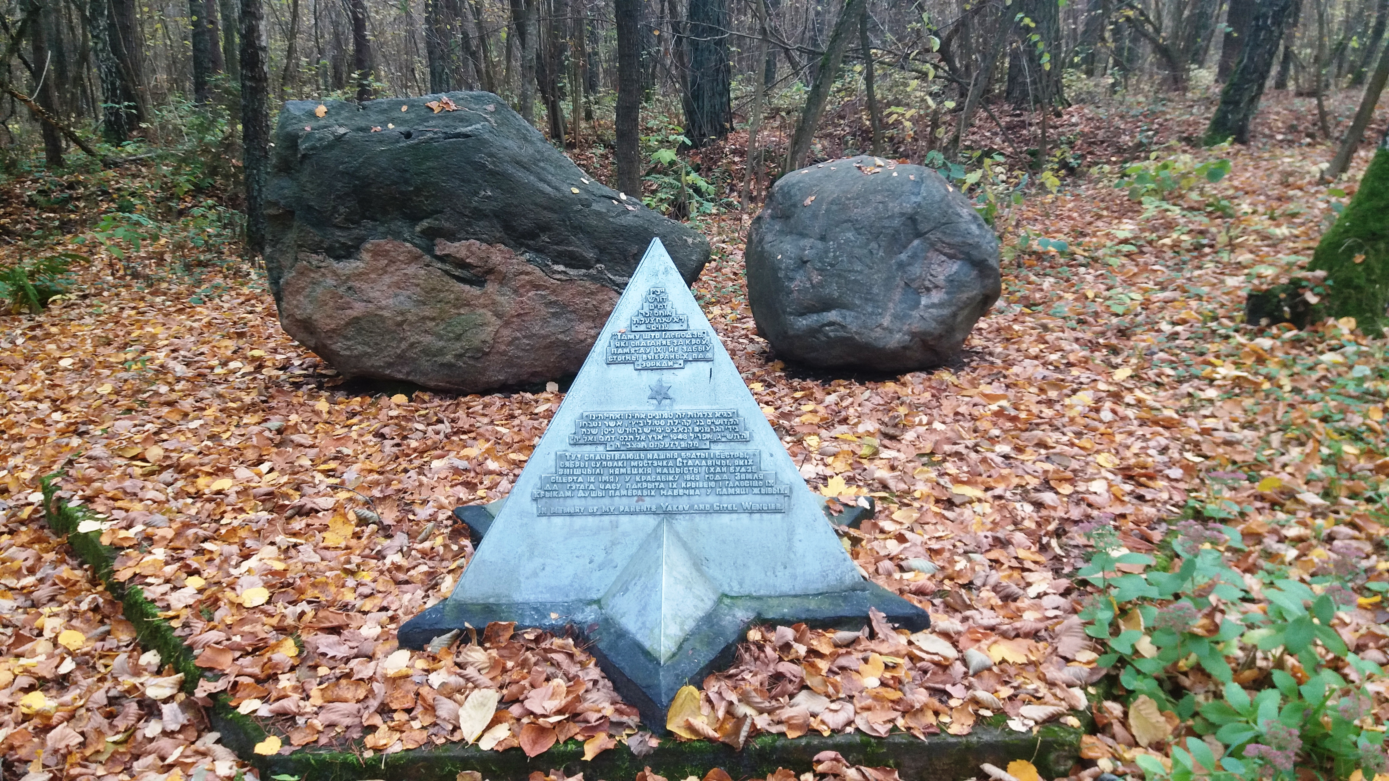 Памятник на братской могиле узников гетто посёлка Столовичи Барановичского района Брестской области. Находится в 3,35 км от границы Столович (от дорожного знака населенного пункта) справа от дороги Р5 в направлении на Арабовщину в 30 метрах от обочины.